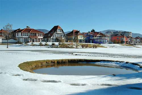 Ихтиман, Голф игрище, Зима; 2006 Пламен Ташев